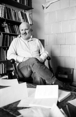 Eörsi István portréja (Budapest, 1990)